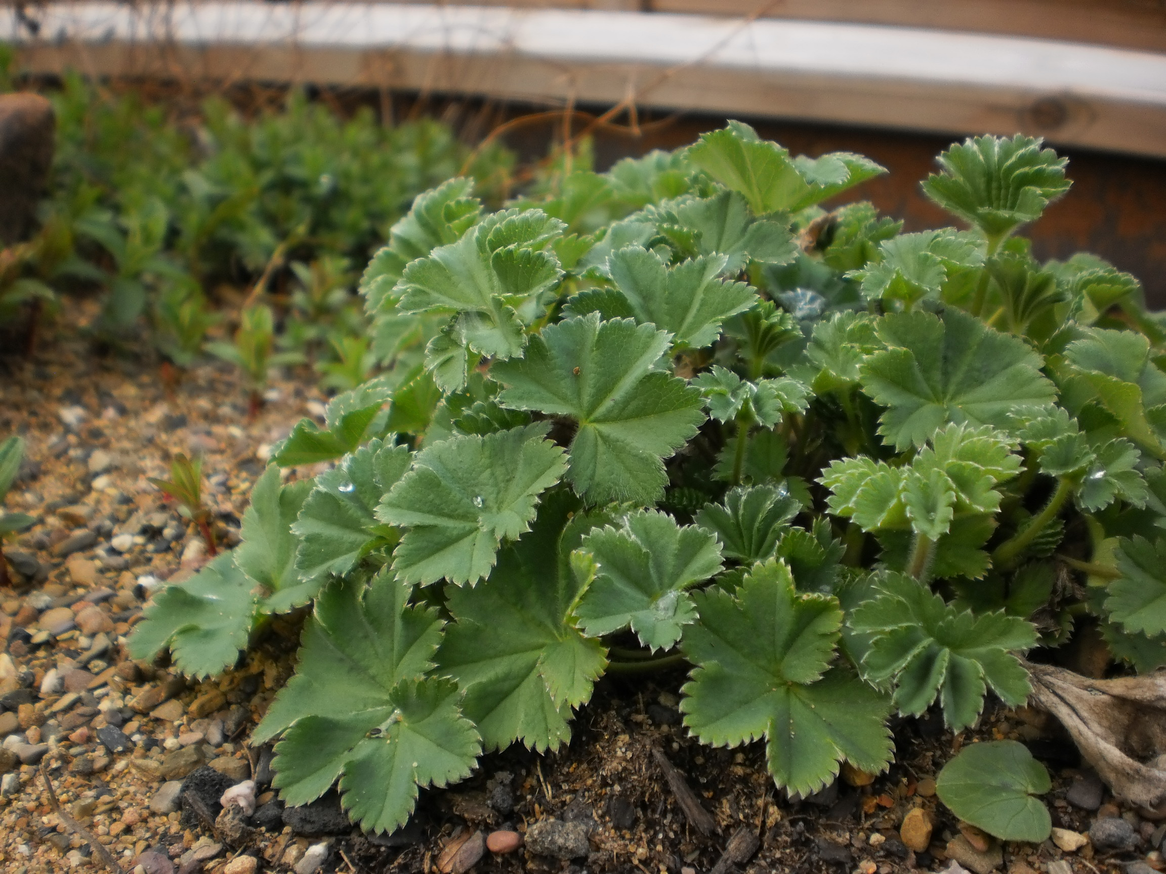 Filziger Frauenmantel Alchemilla glaucescens an einem trockenem Tag (6. April 2019) auf der Borstgrasrasen-Archefläche im Alten botanischen Garten von Marburg. An einigen Stängeln, an Blatträndern und auf der Blattoberfläche ist gut die leicht filzig wirkende Behaarung zu erkennen.